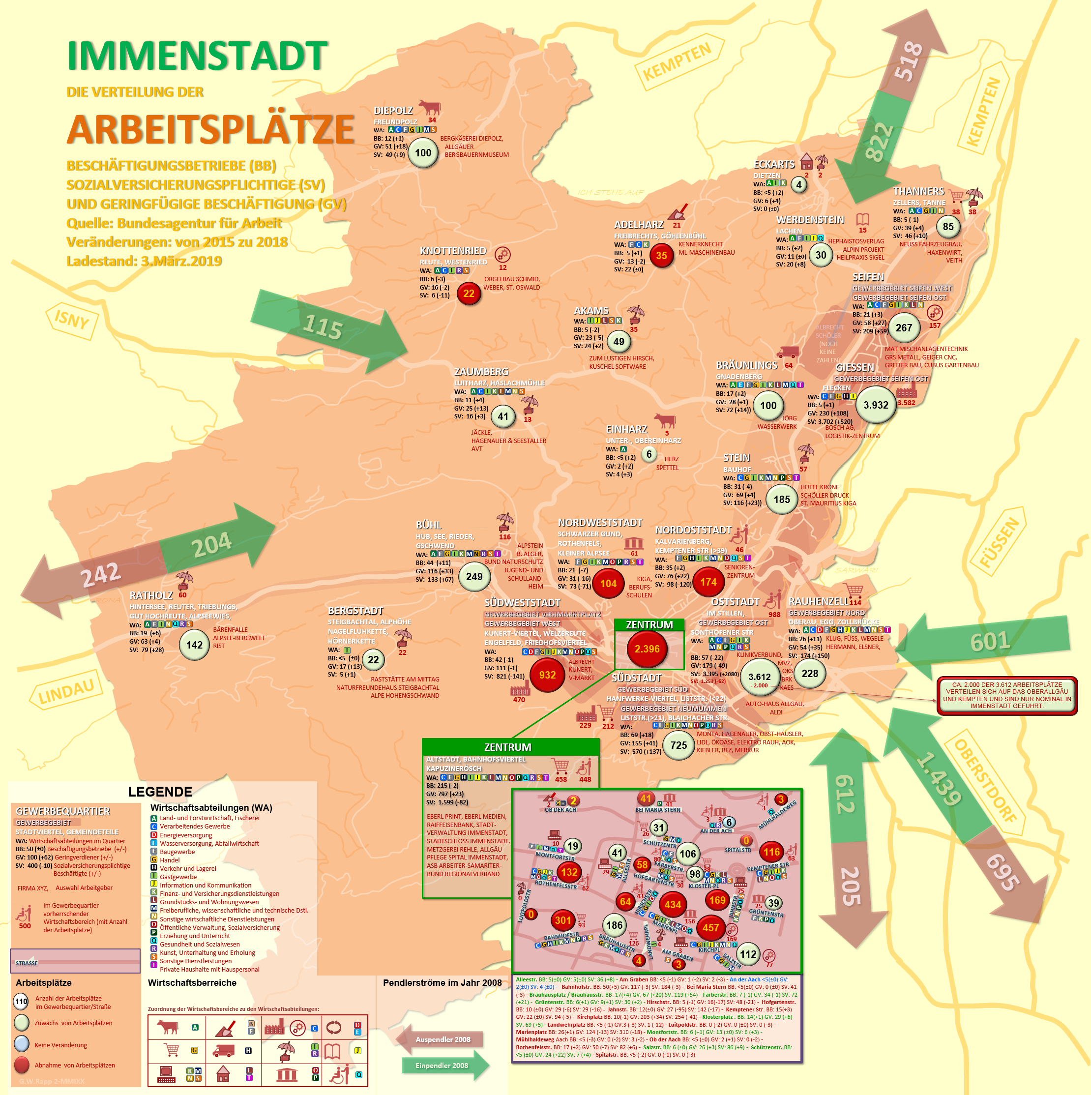 Anzahl der Arbeitsplätze in Stadtteilen und Straßen im Verhältnis zur letzten Zählung 2015